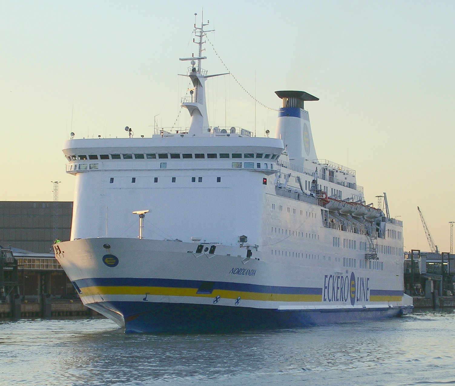 M/S Nordlandia arriving at Helsinki.